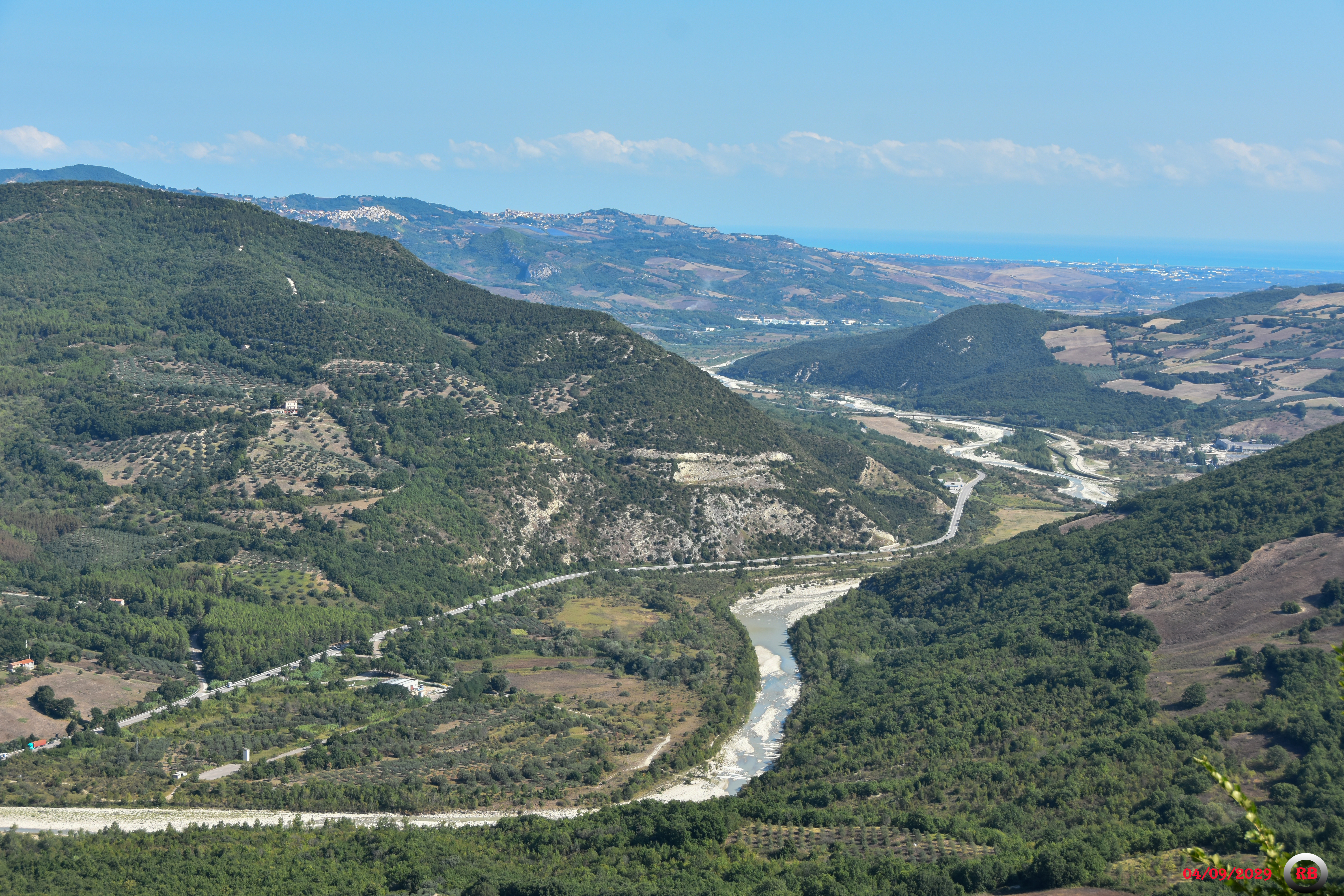 immagine jpeg del 4 settembre 2019 ore 10,23 6000x4000 pixel fotocamera Nikon D7200 f/8 1/500 sec ISO 250